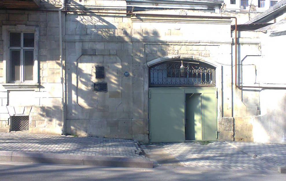 Это улица, на которой жил Зульфугар Гаджибеков (слева можно увидеть фото памятной доски, уставленной в честь композитора)